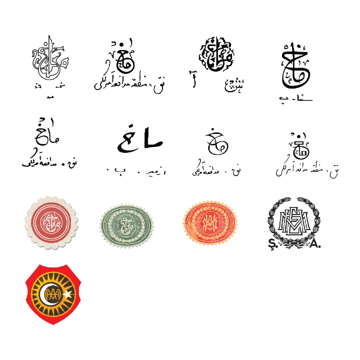 Milli emniyet hizmeti kullandığı logolar